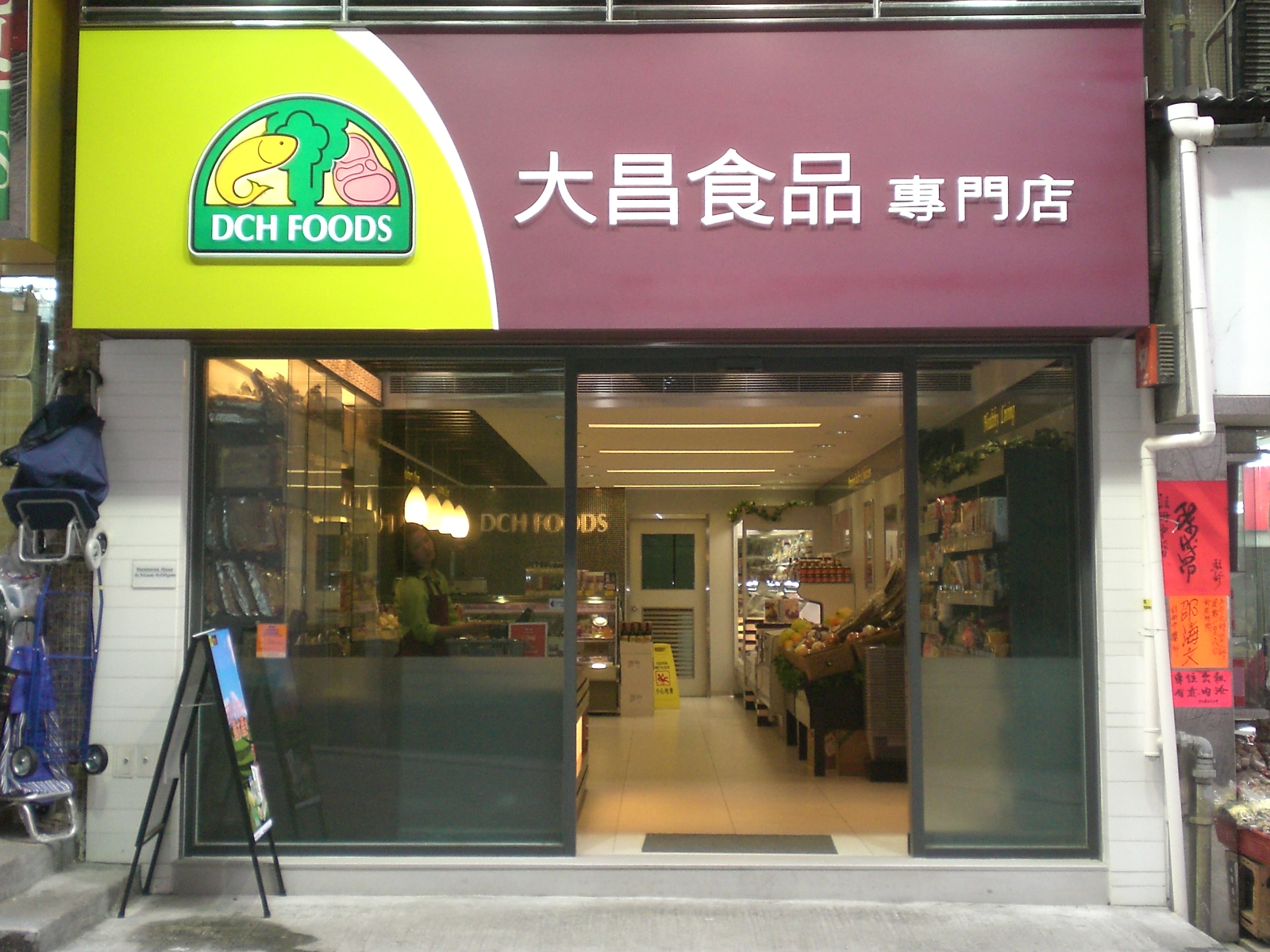 跑馬地zh:集祥街大昌食品專門店